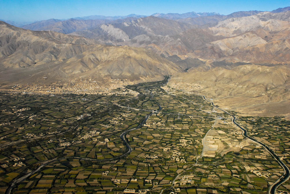 パンジシール渓谷の入り口であるパルヴァーン州のチャーリーカールの様子